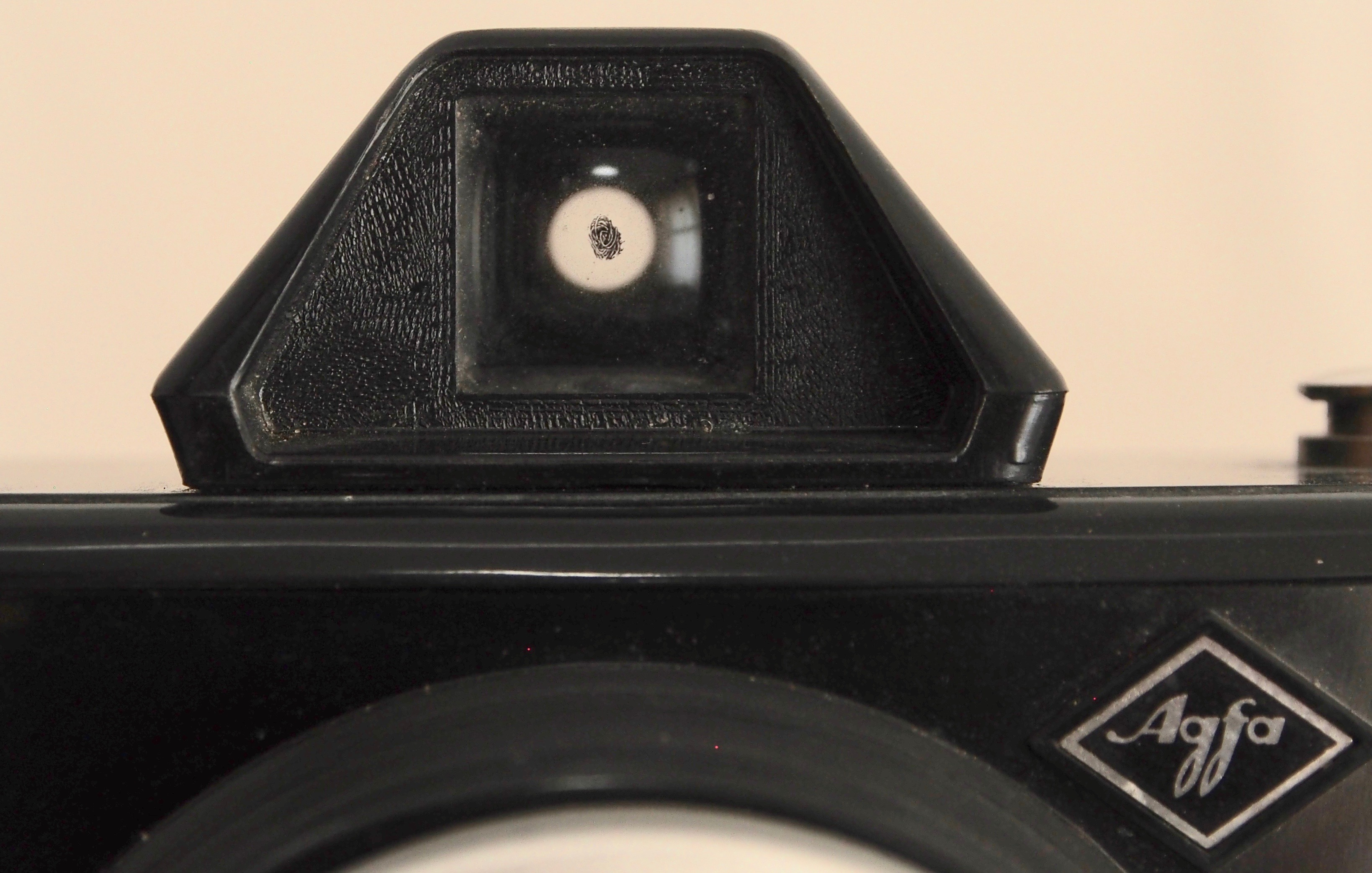 Clci Sucher gekragt